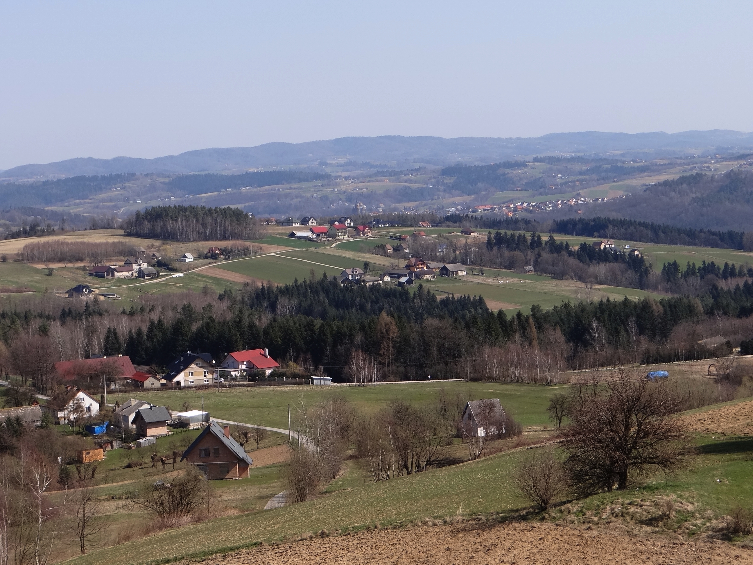 Widok z wieży widokowej w Bruśniku na Bruśnik, Zagórze (część Kąśnej Dolnej) i Ciężkowice.